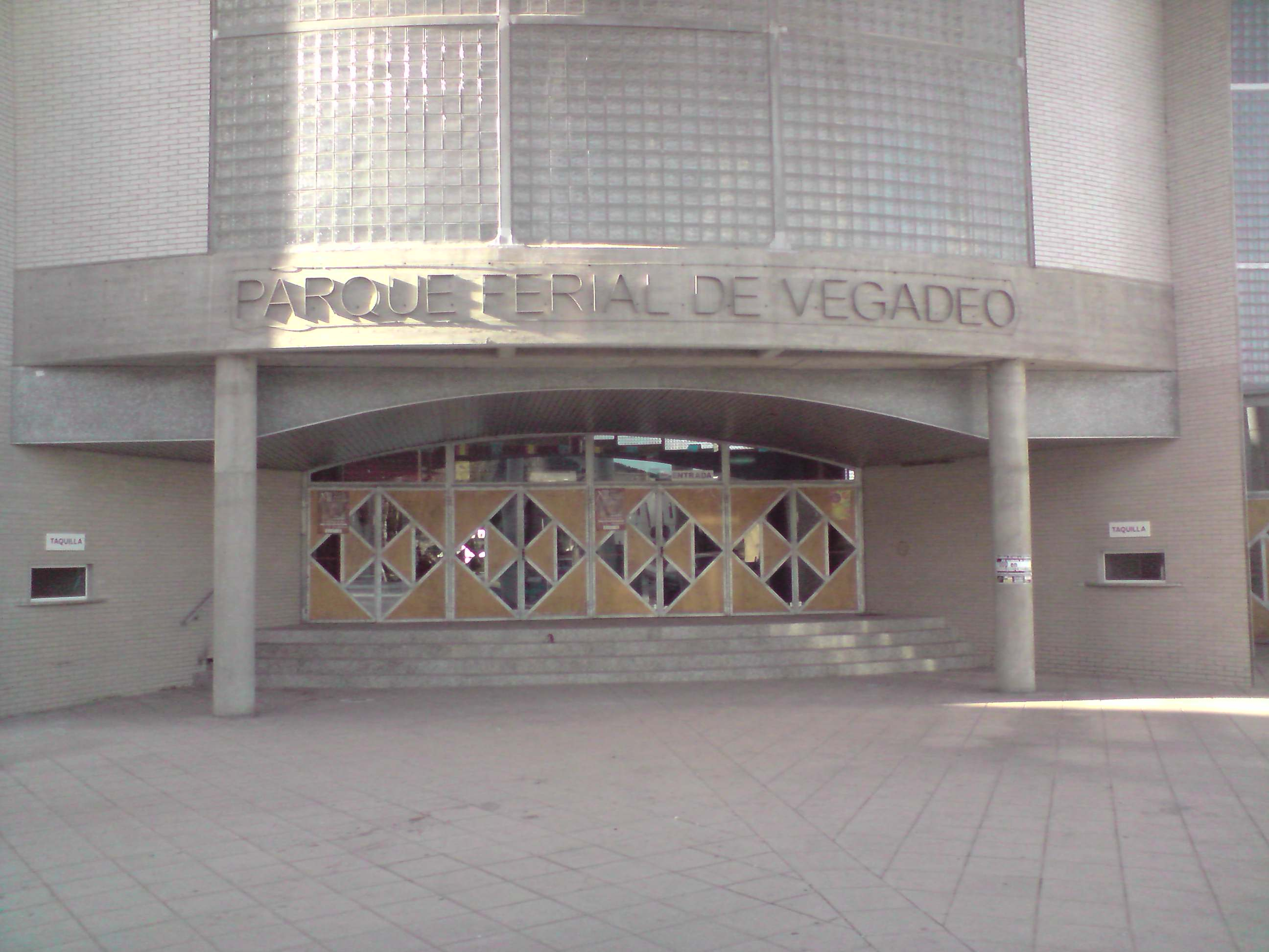 Recinto Ferial de Vegadeo